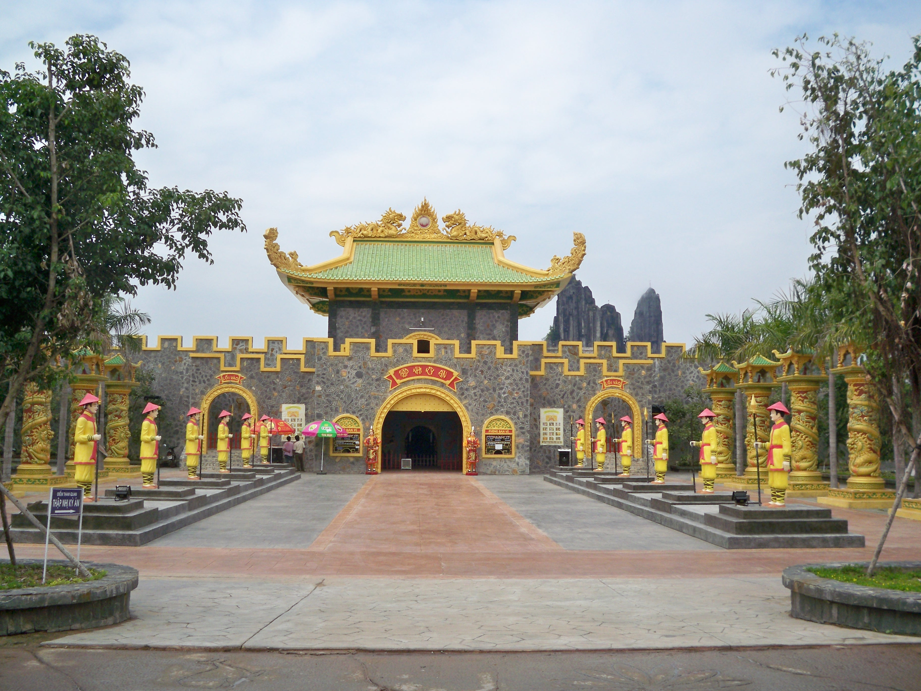 Thập nhị cung kỳ án - Đại Nam